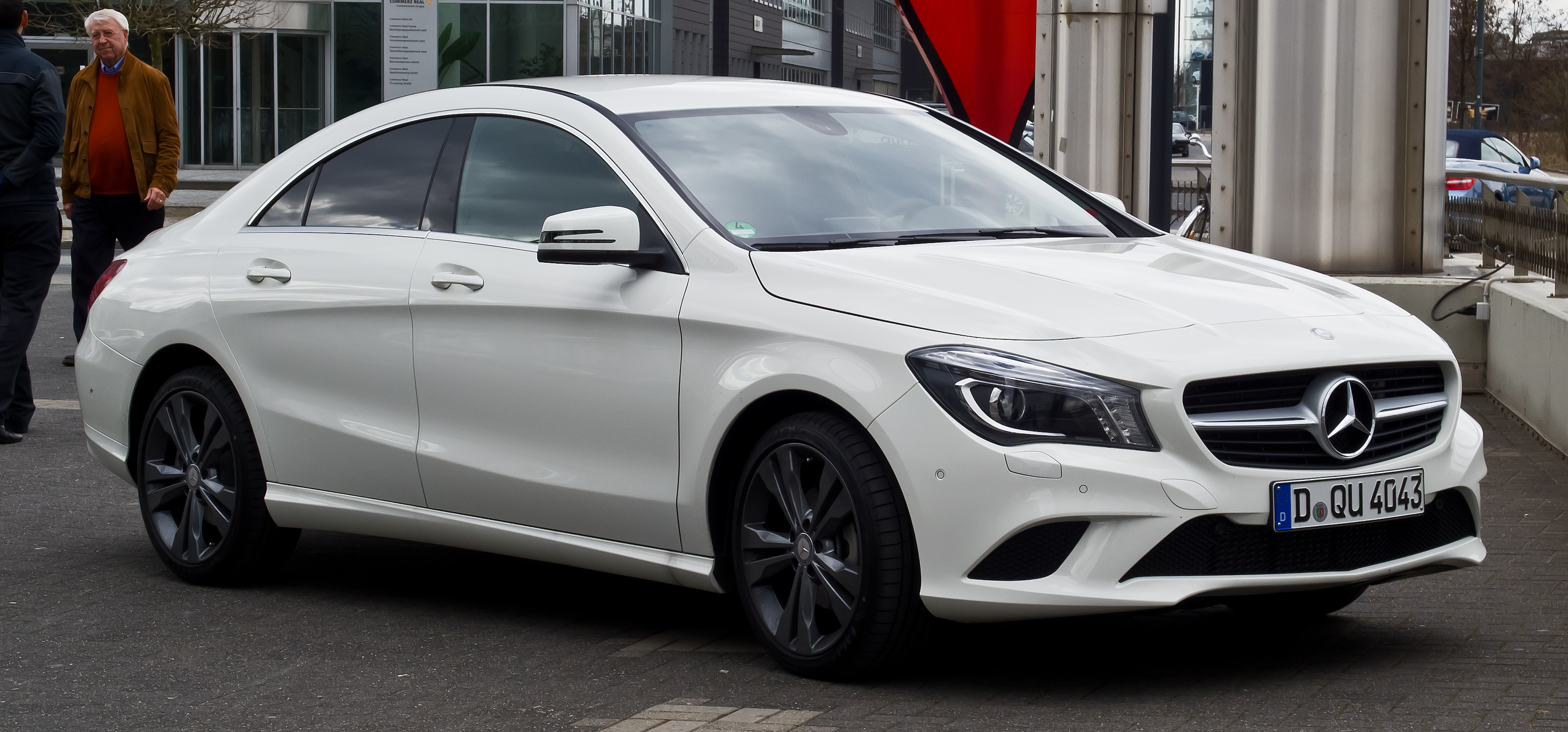 Mercedes-Benz CLA 200 (C 117)